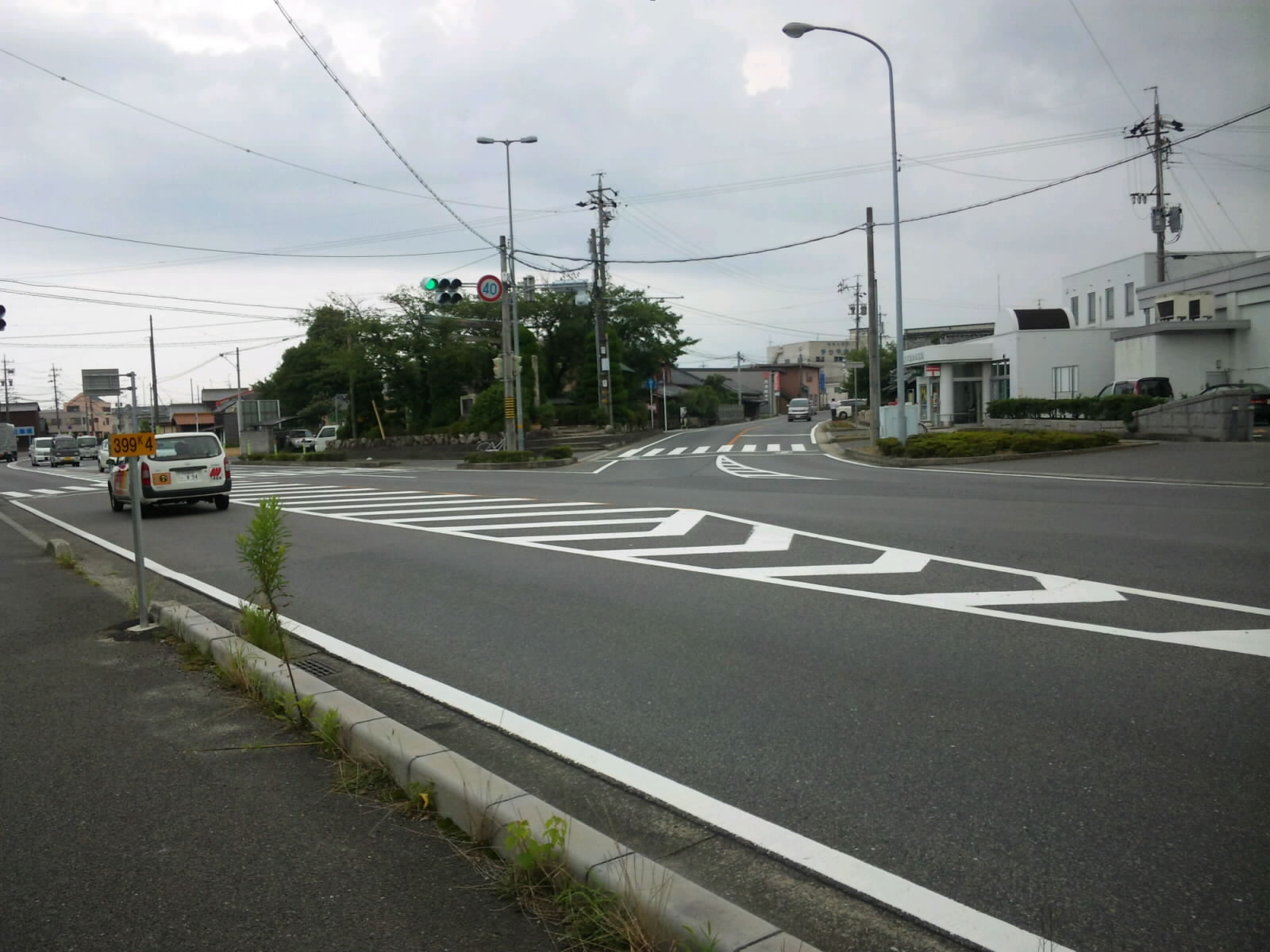 四日市市にある日永追分 伊勢街道と東海道の分岐点